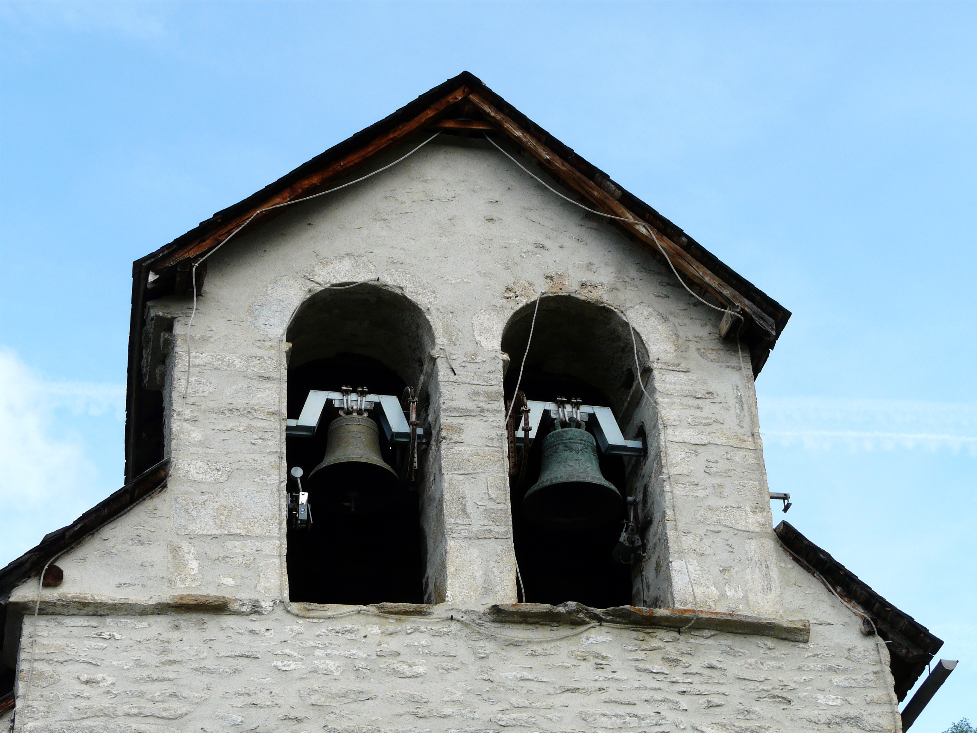 Le clocher-mur de l'église Sainte-Marie-Madeleine, Loudervielle, Hautes-Pyrénées, France.